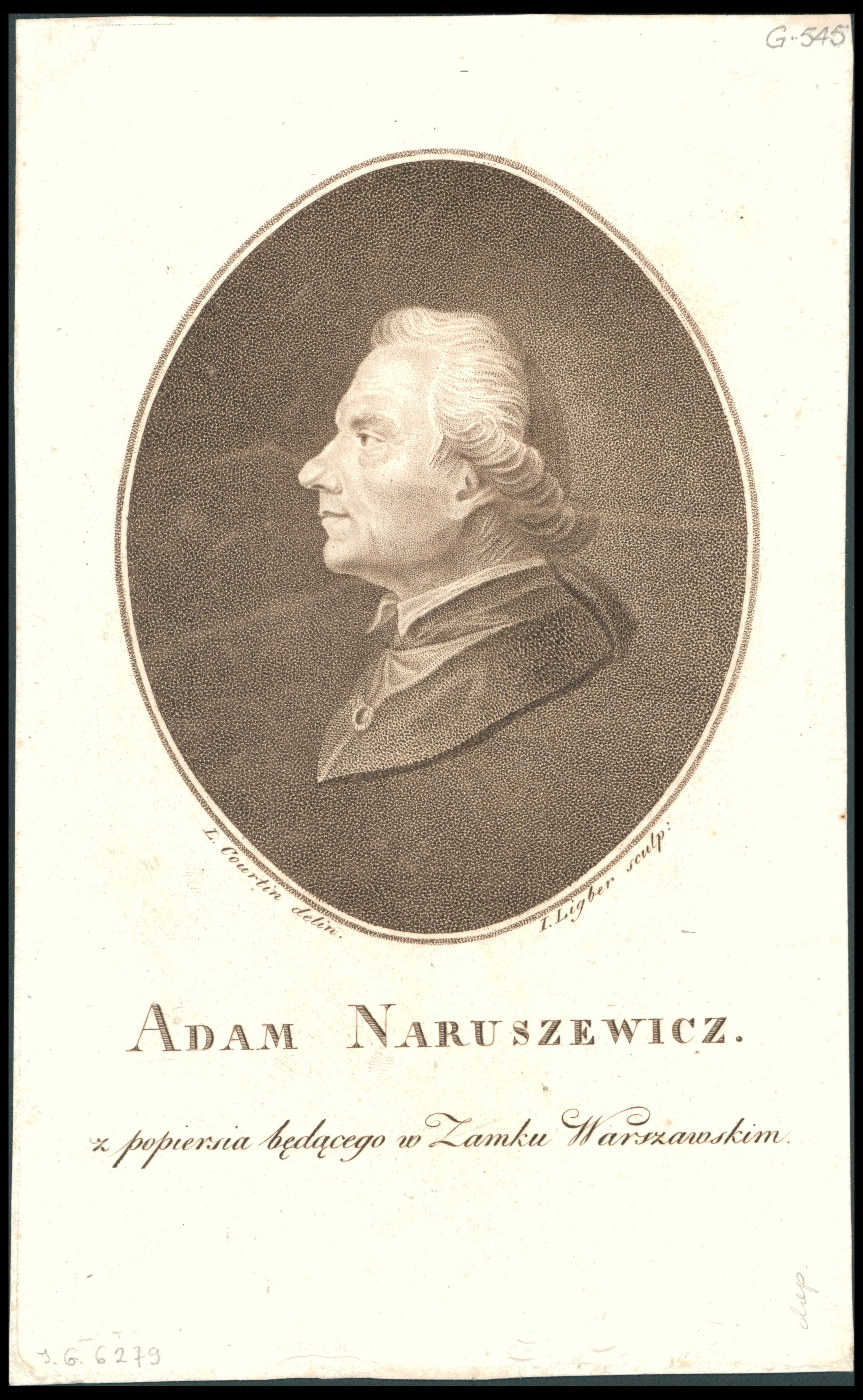 Беларуская (тарашкевіца): Партрэт Адама Нарушэвіча (Adam Naruševič)